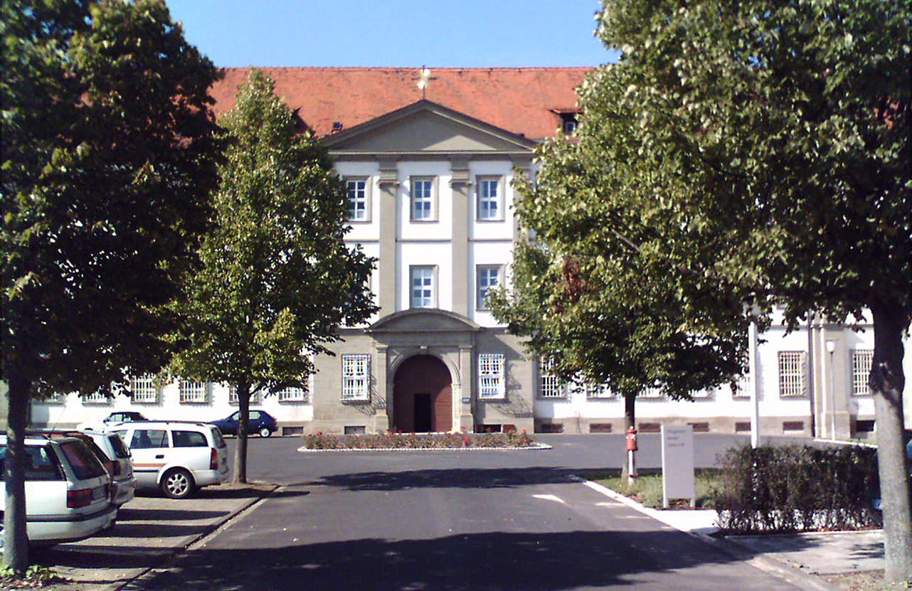 Uploader ist vermutlich Urheber (vgl. Bild:050920 153112.jpg)